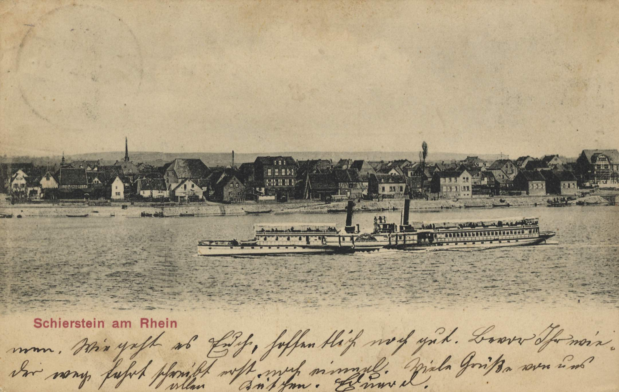 Stadtansicht vom Rhein; Dampfer